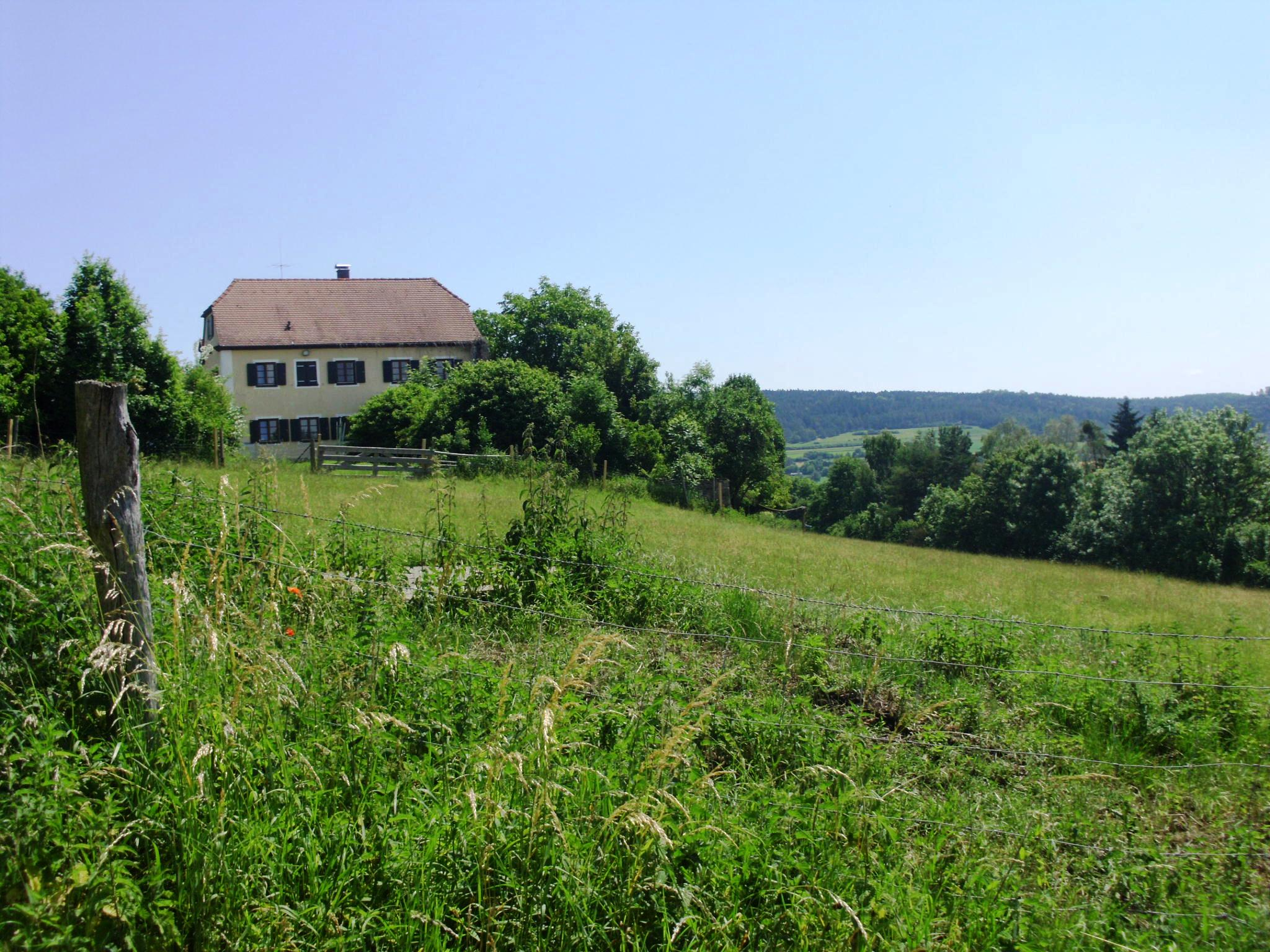 Weinbergshof, Ortsteil von Treuchtlingen im Landkreis Weißenburg-Gunzenhausen